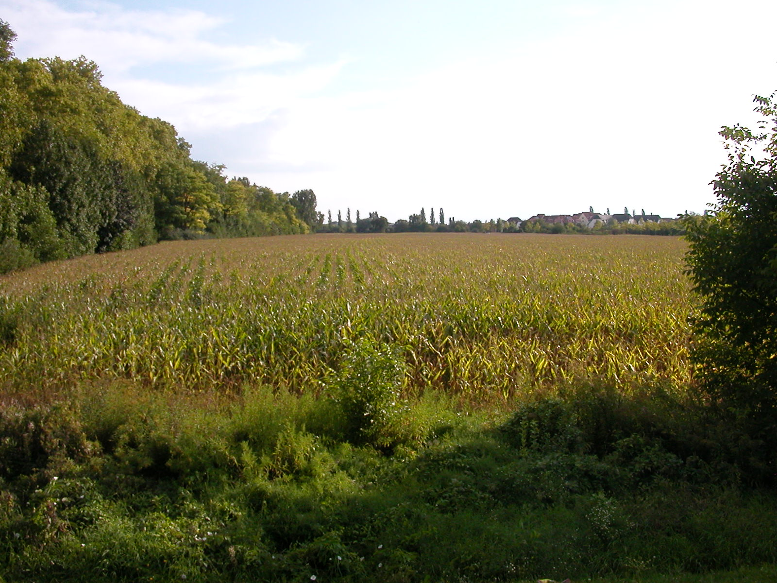 Champ se situant entre le pont de la rue Lixenbuhl, le canal, la rue des Vignes, la rue de la Ceinture et l'EREA.